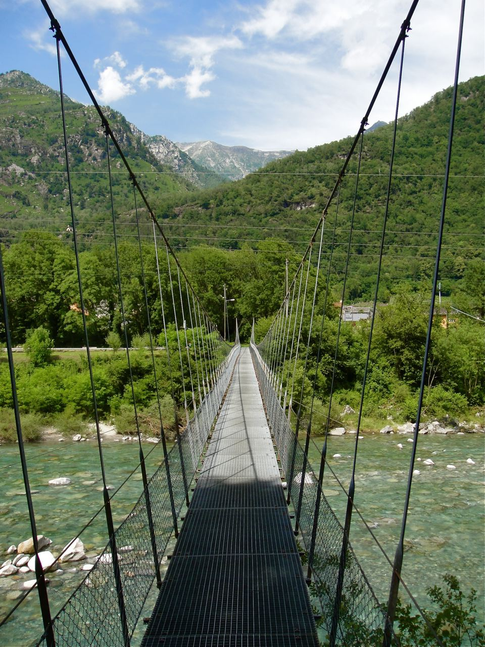 Brücke Maggia Mohegno